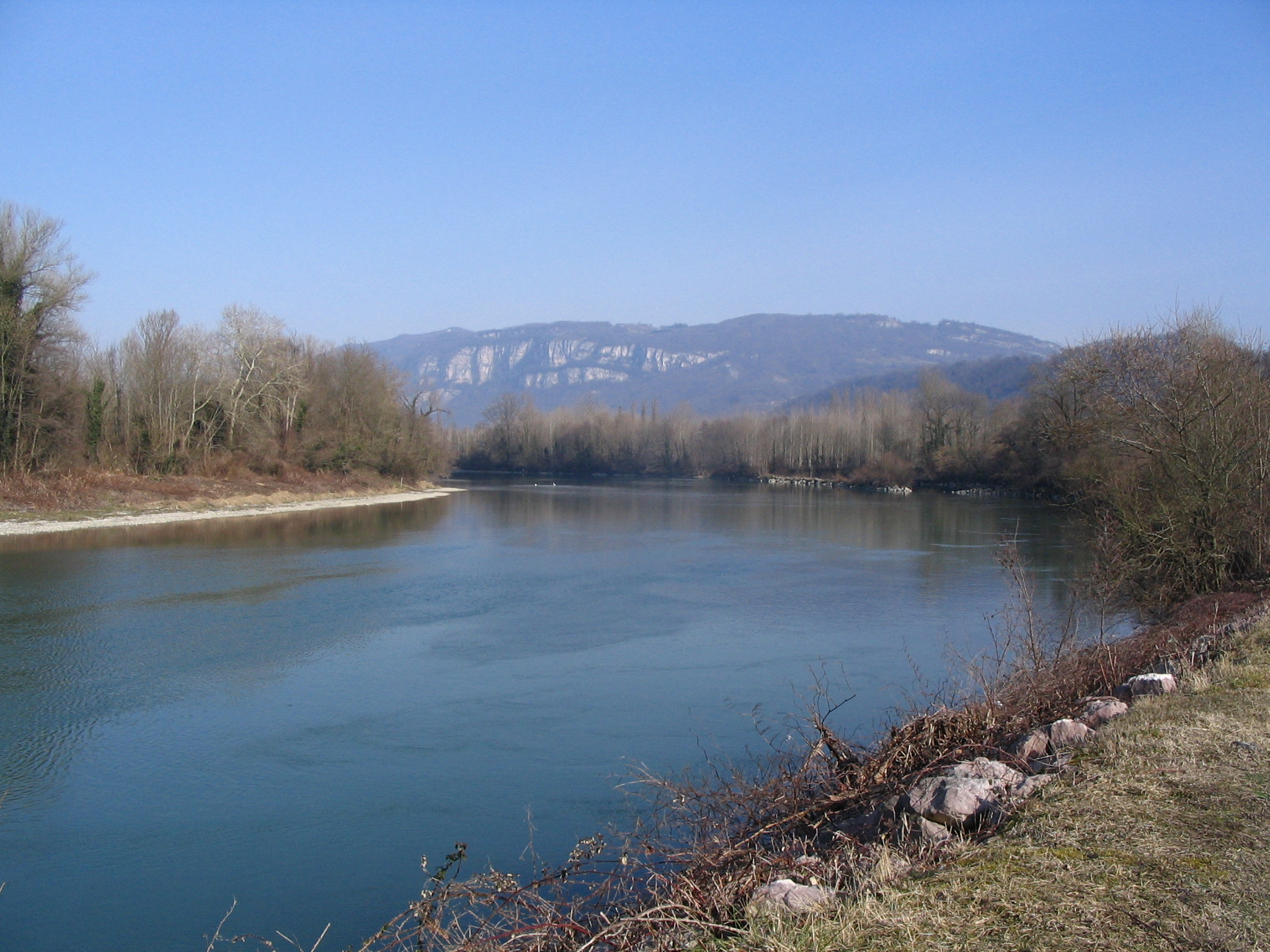 Saint-Genix-sur-Guiers - Bord du Rhone - en amont du Guiers